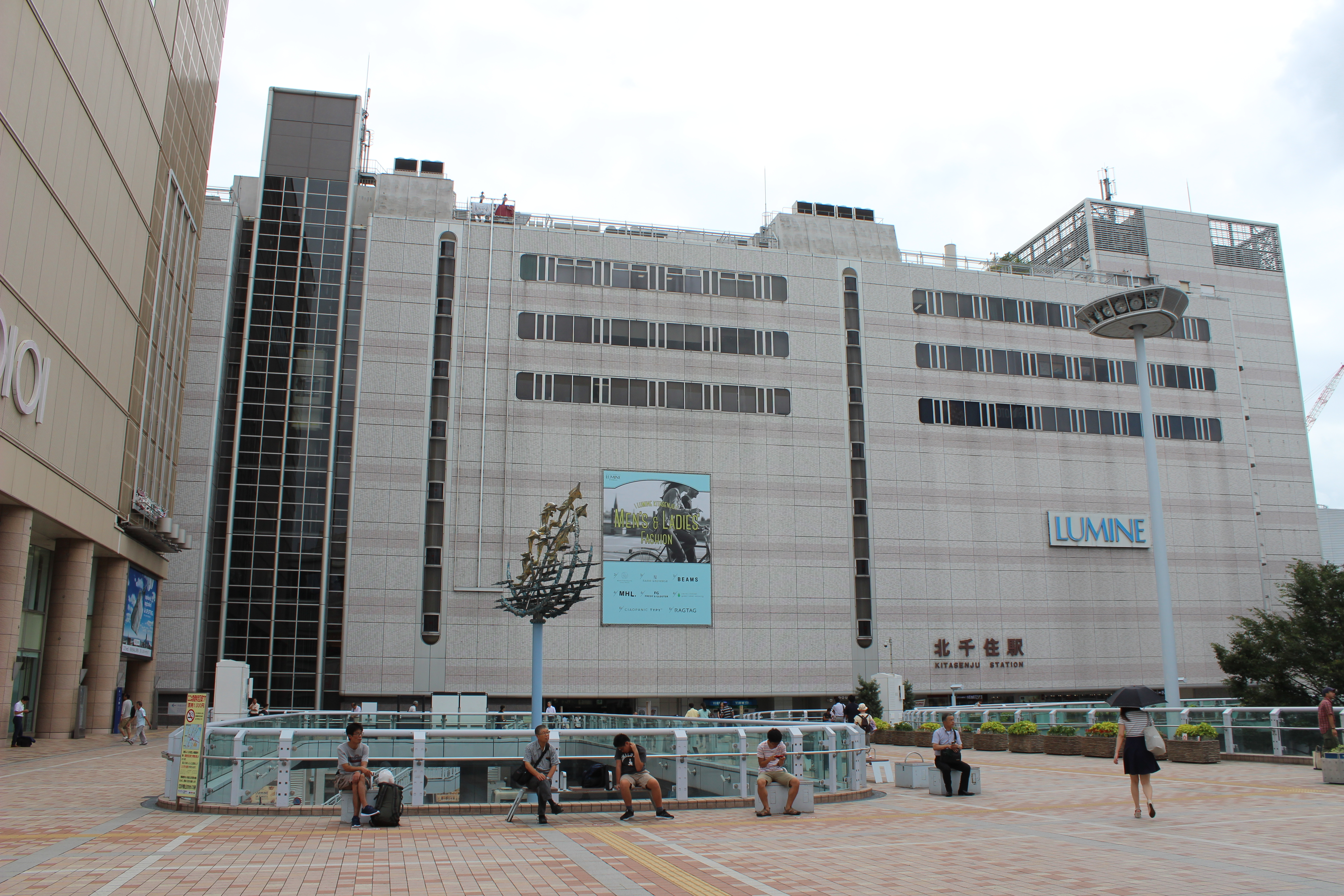 北千住駅西口